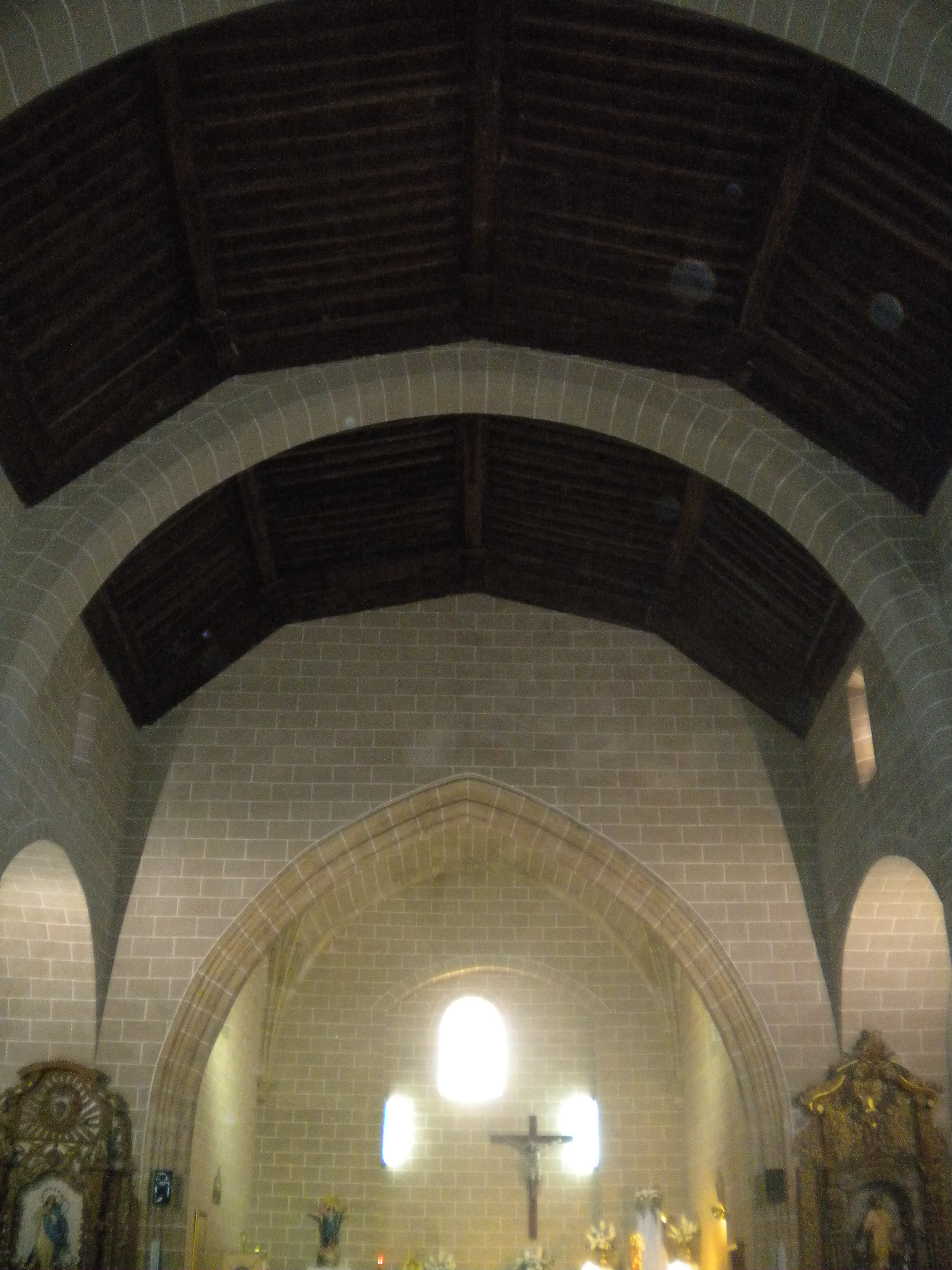 Interior de la Iglesia parroquial de Nuestra Señora de la Asunción de Talaván (Extremadura, España)